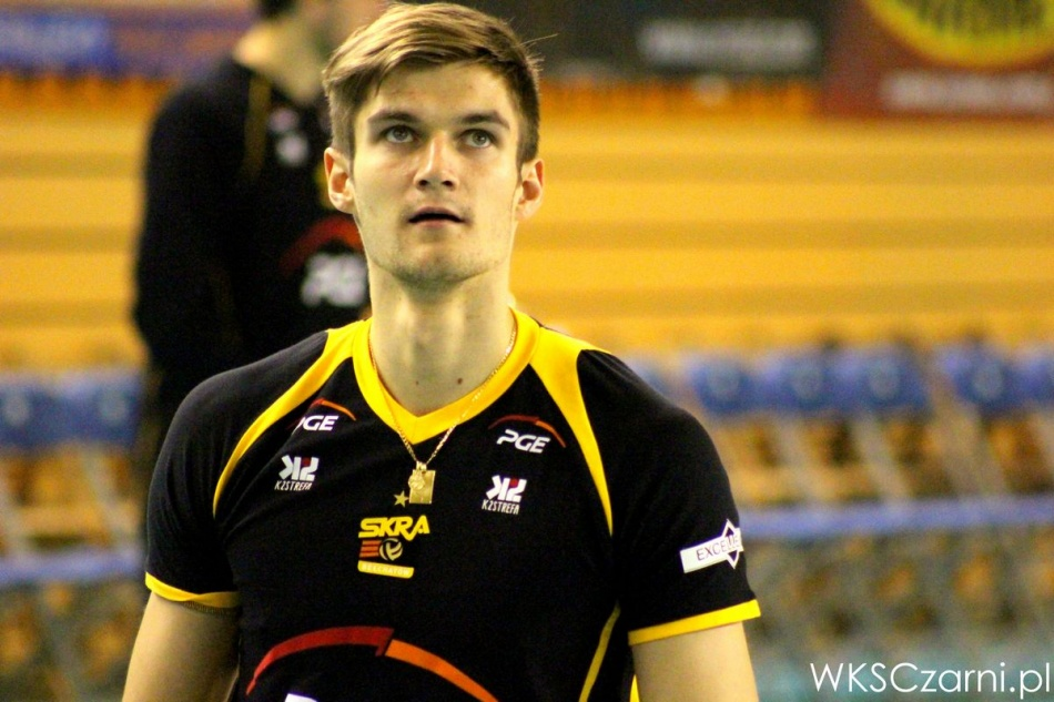 Karol Kłos - polski siatkarz, środkowy. Sezon 2014-15